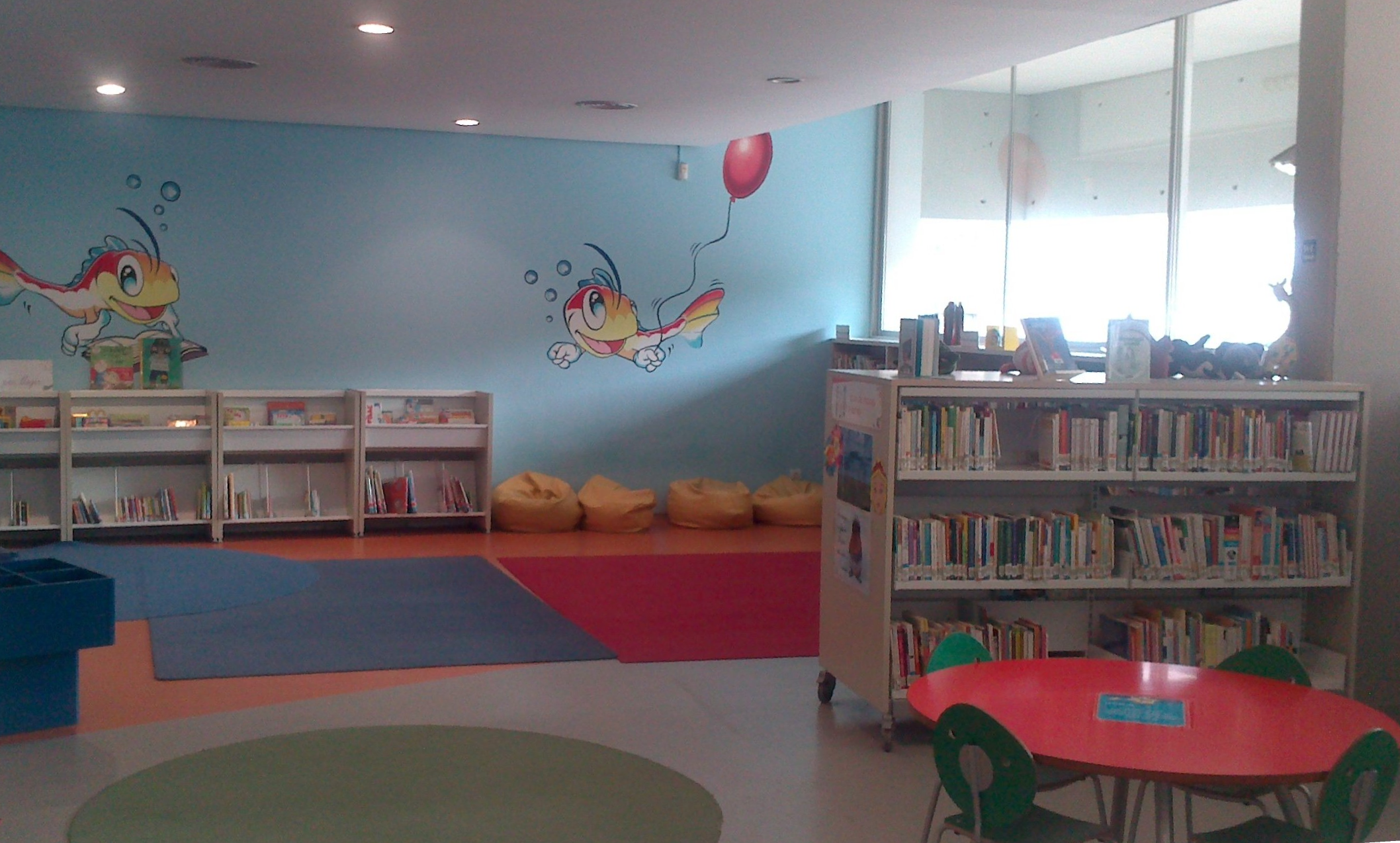 Zona del fons d'imaginació de la Sala Infantil de la Biblioteca Comarcal de Blanes.